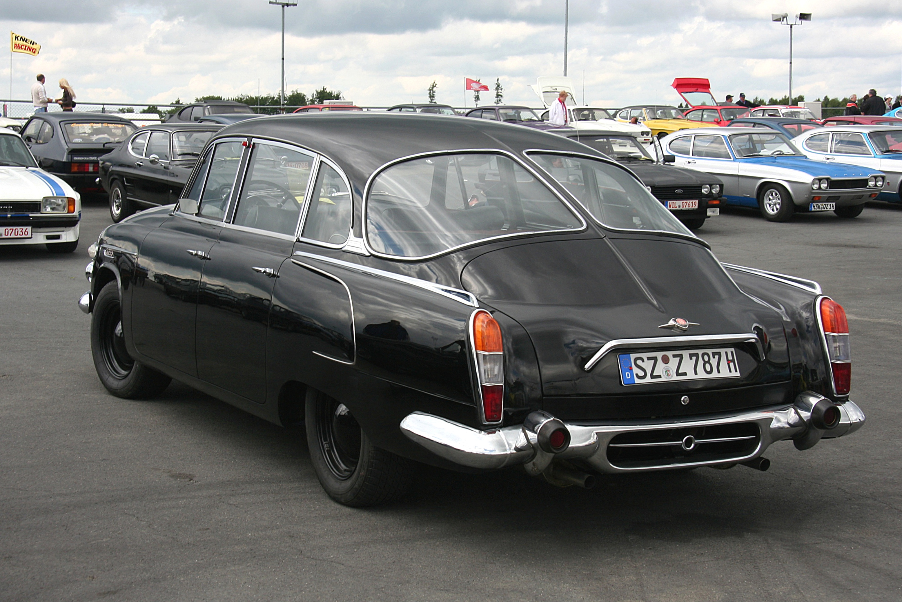 Tatra 603, Typ 1, beim Oldtimer Festival 2008 auf dem Fahrerlagerparkplatz des Nürburgrings. Kennzeichen des Fahrzeugs verändert.